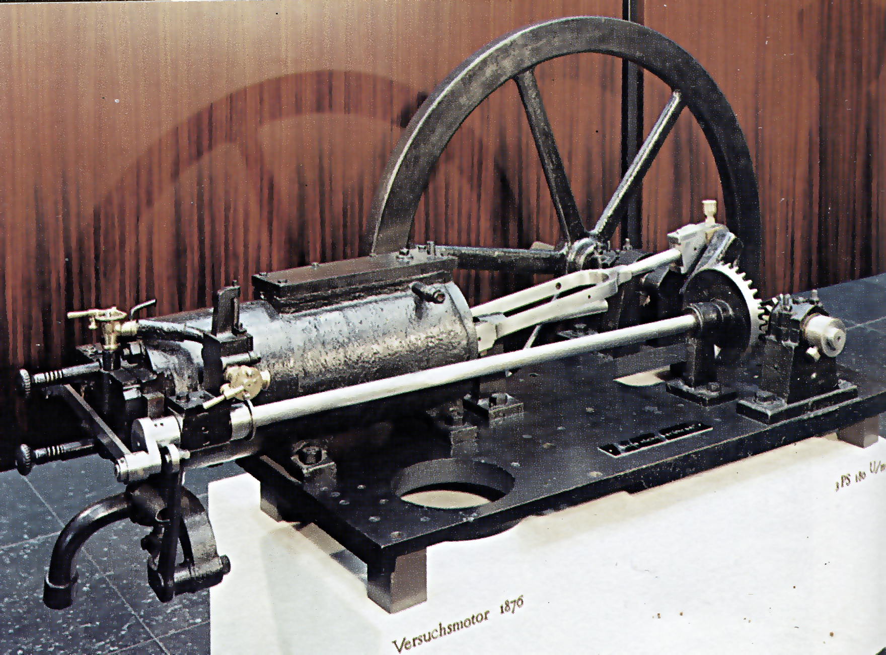 Viertactversuchsmotor_von_Otto